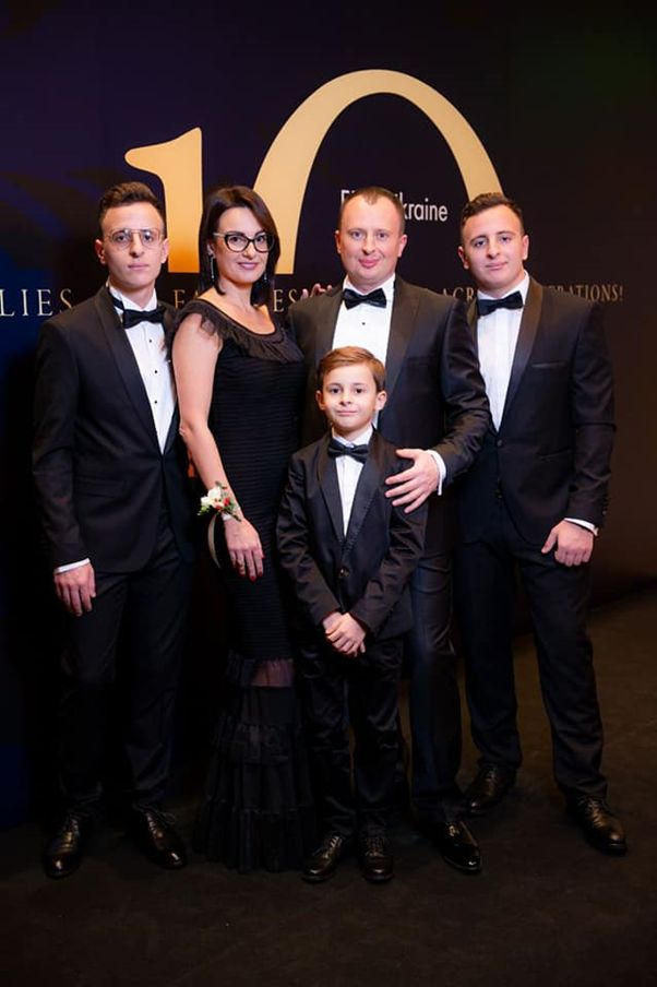 Родина